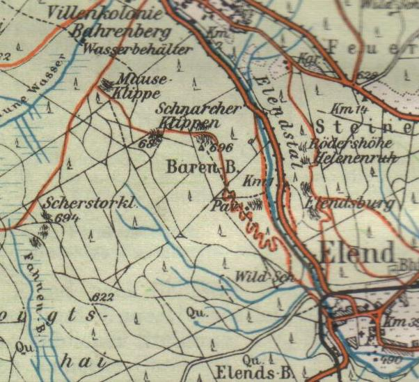 Karte von Elend im Maßstab 1:50.000 (Original), 1912.